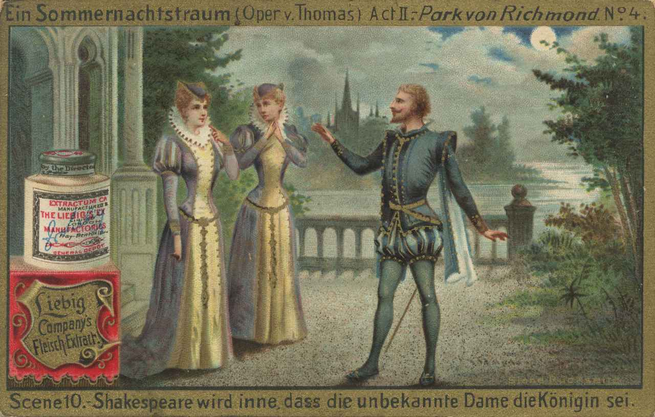 Act II. – Park von Richmond. No. 4 – Scene 10. – Shakespeare wird inne, dass die unbekannte Dame die Königin sei